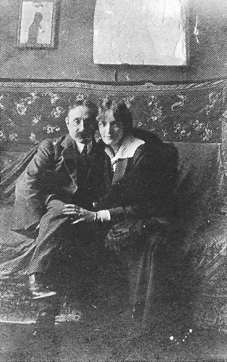 Photographie d'Albert Marquet et de sa compagne-modèle Yvonne (Ernestine Bazin) prise dans l'atelier de Marquet 19 quai Saint-Michel vers 1910.